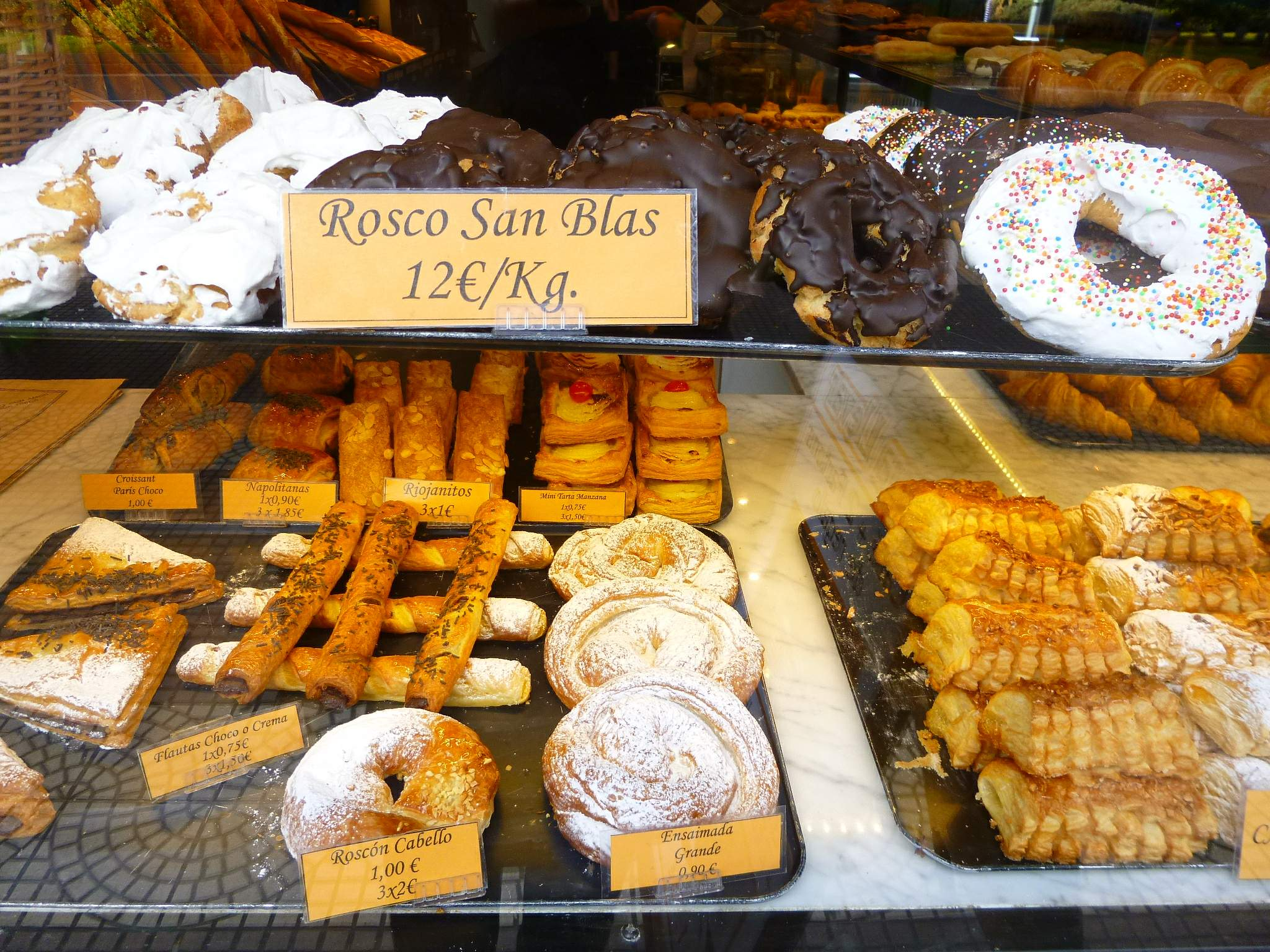 Dulces en Logroño